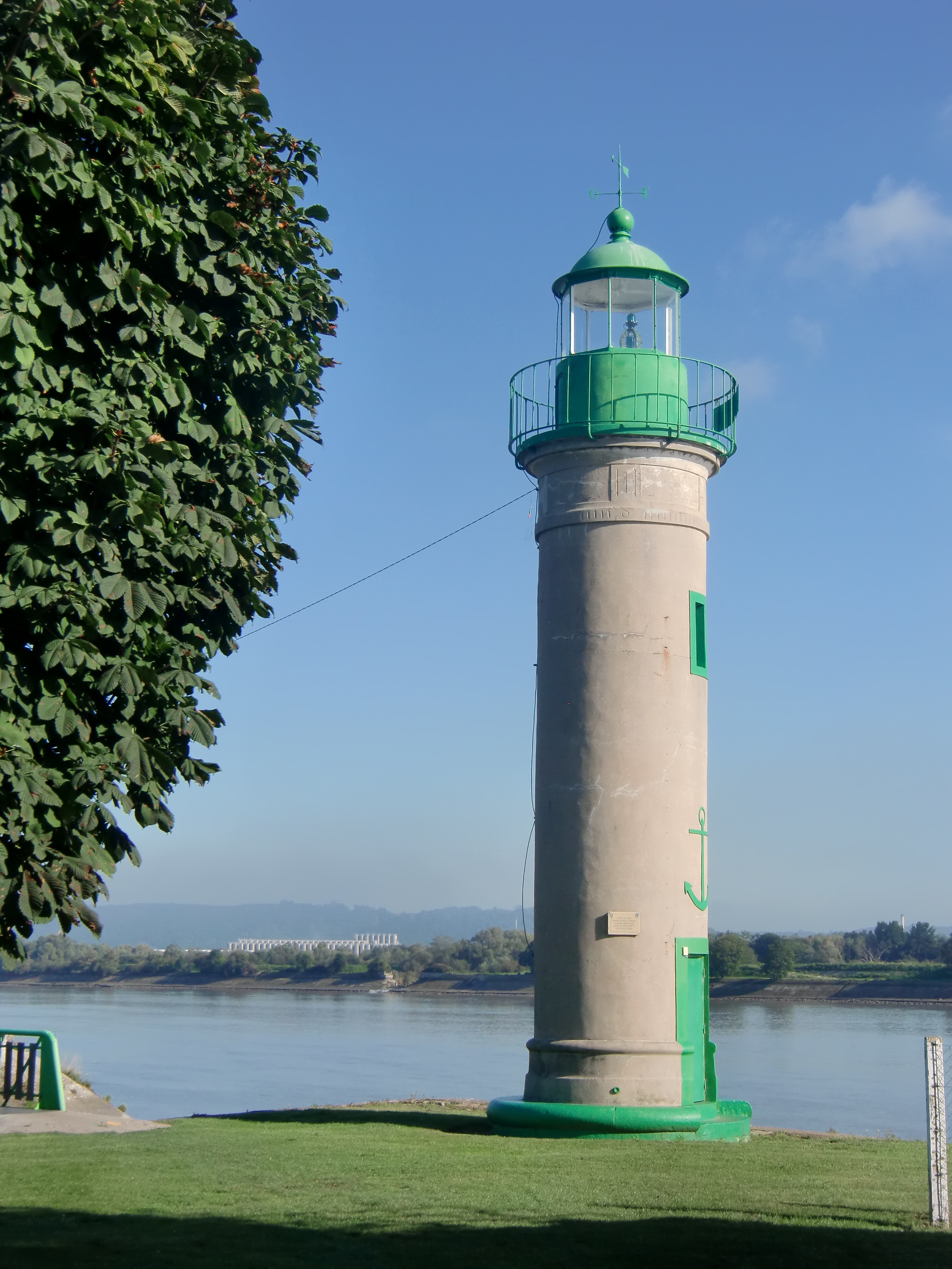 Phare (ou feu) de Quillebeuf (Eure, Normandie, France)